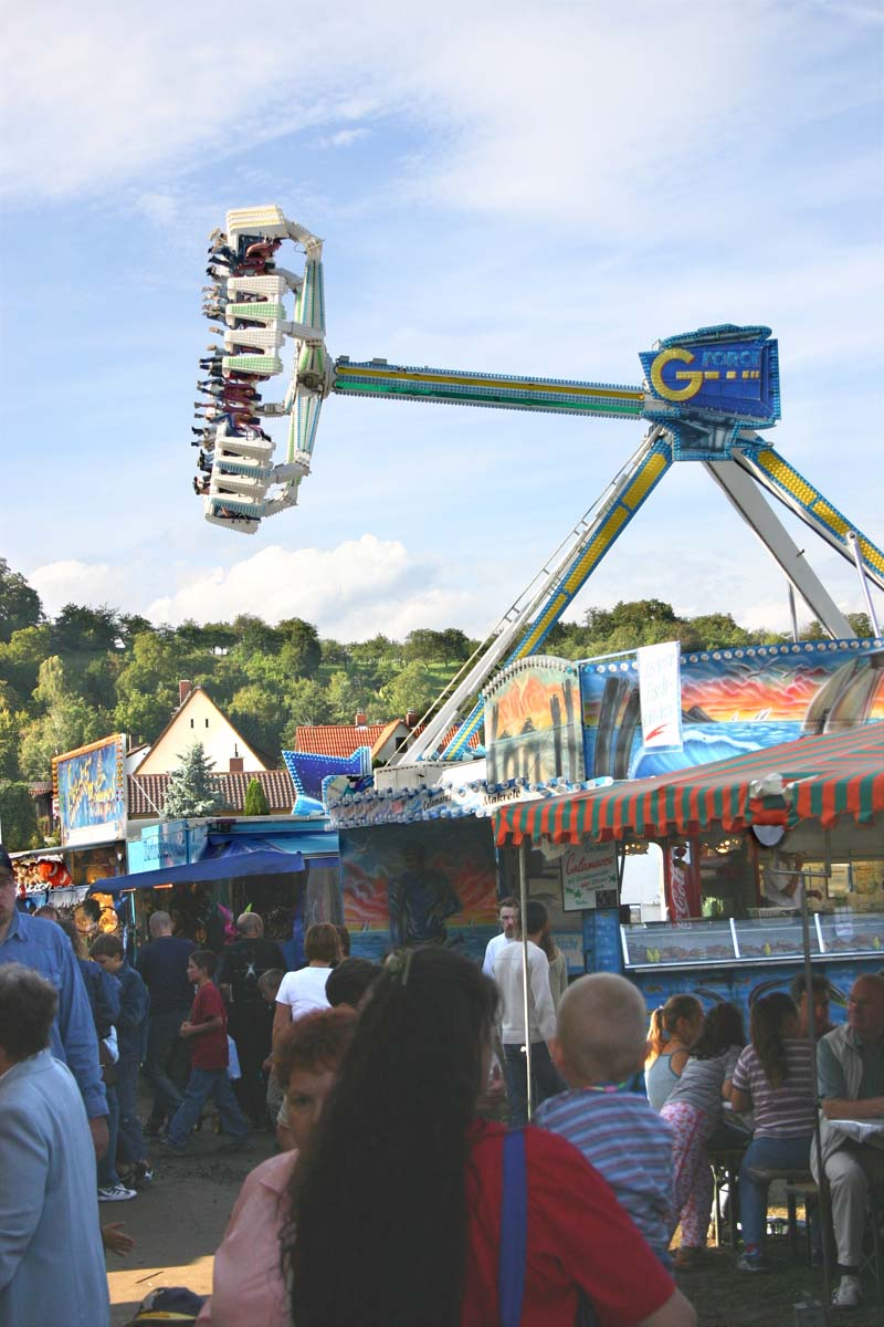 Düdelsheimer Markt 2004 Andere Versionen